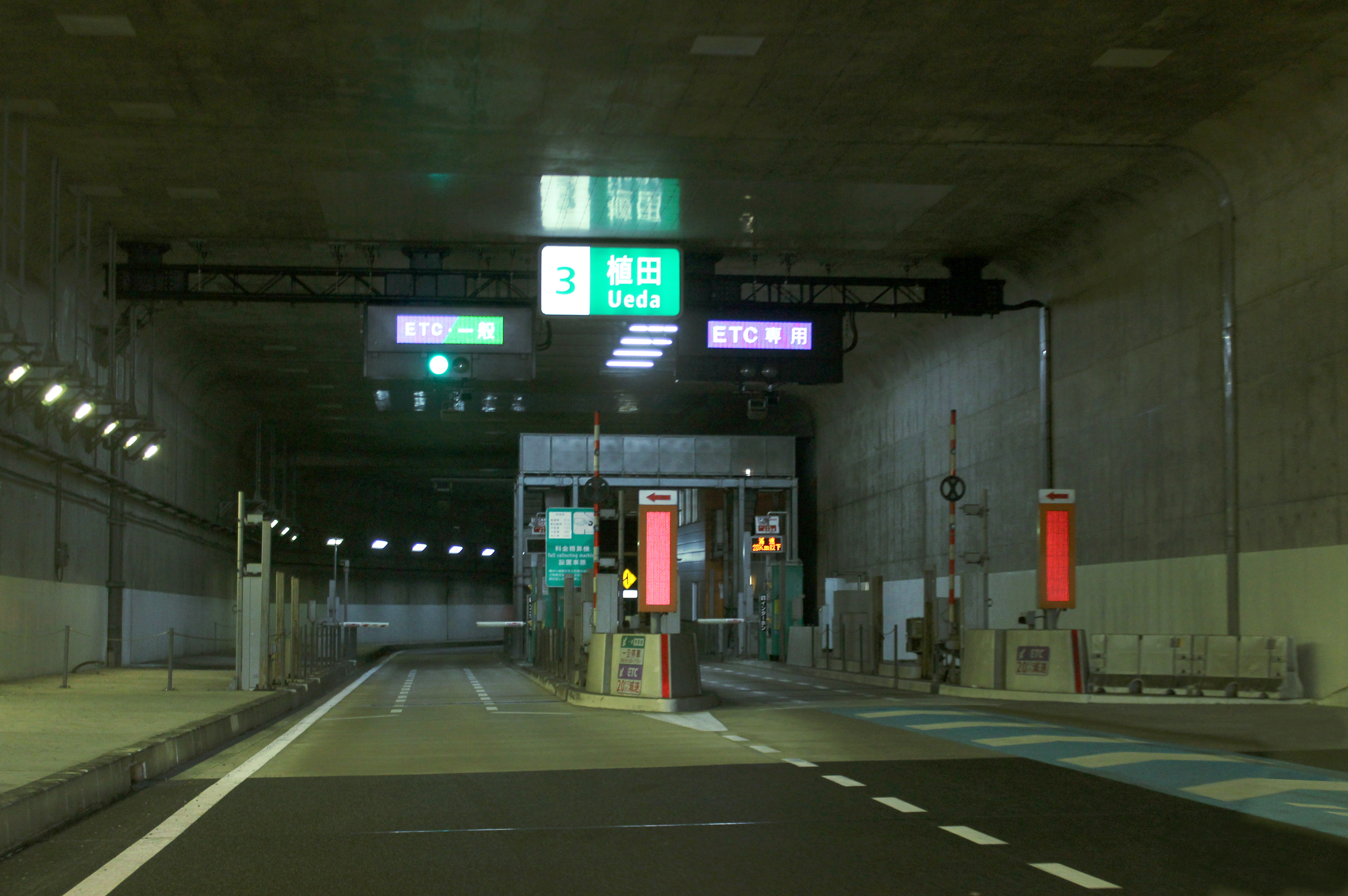 名二環 植田IC（北側）地階トールゲート